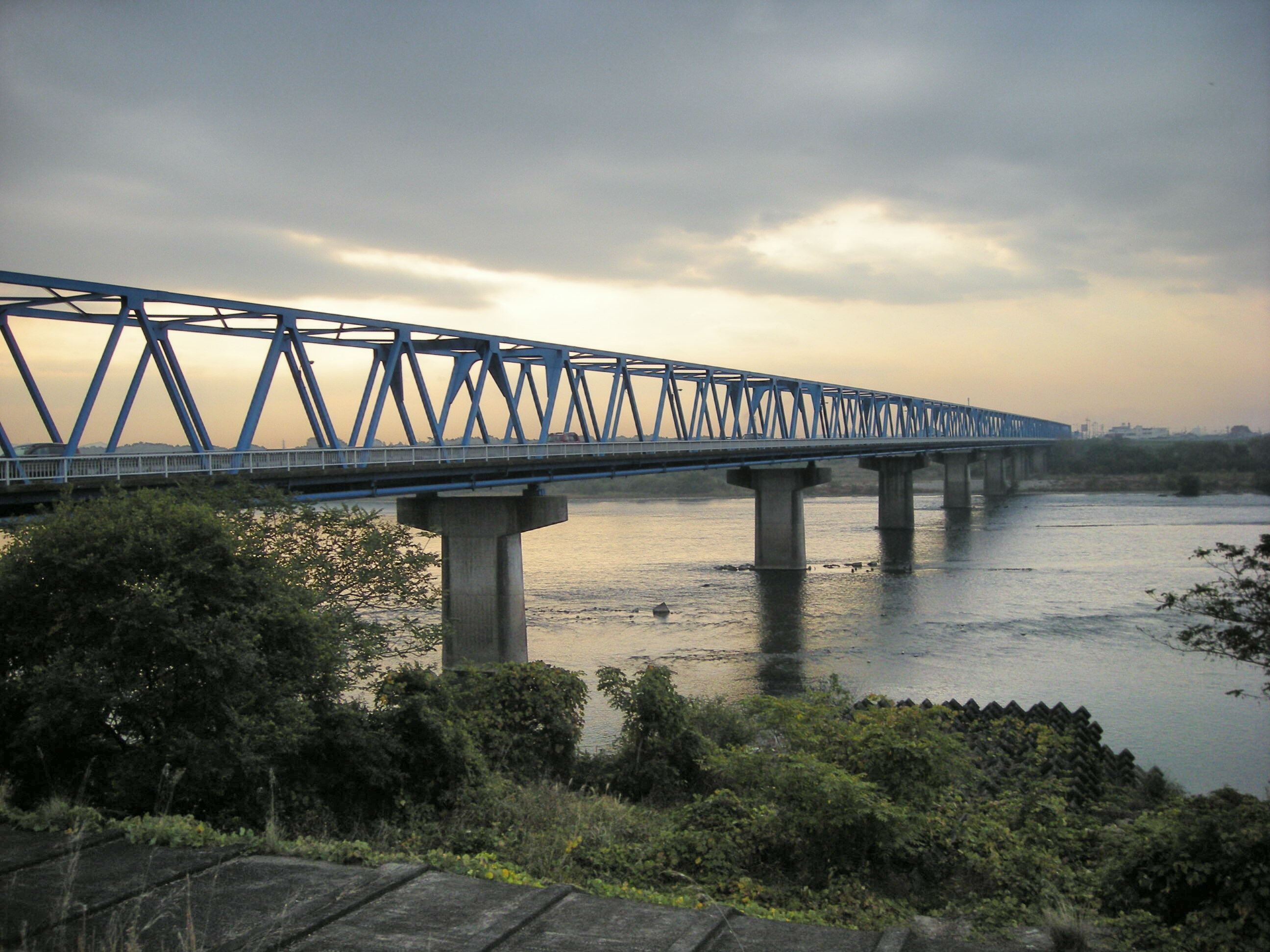 aigioohashi bridge（愛岐大橋）